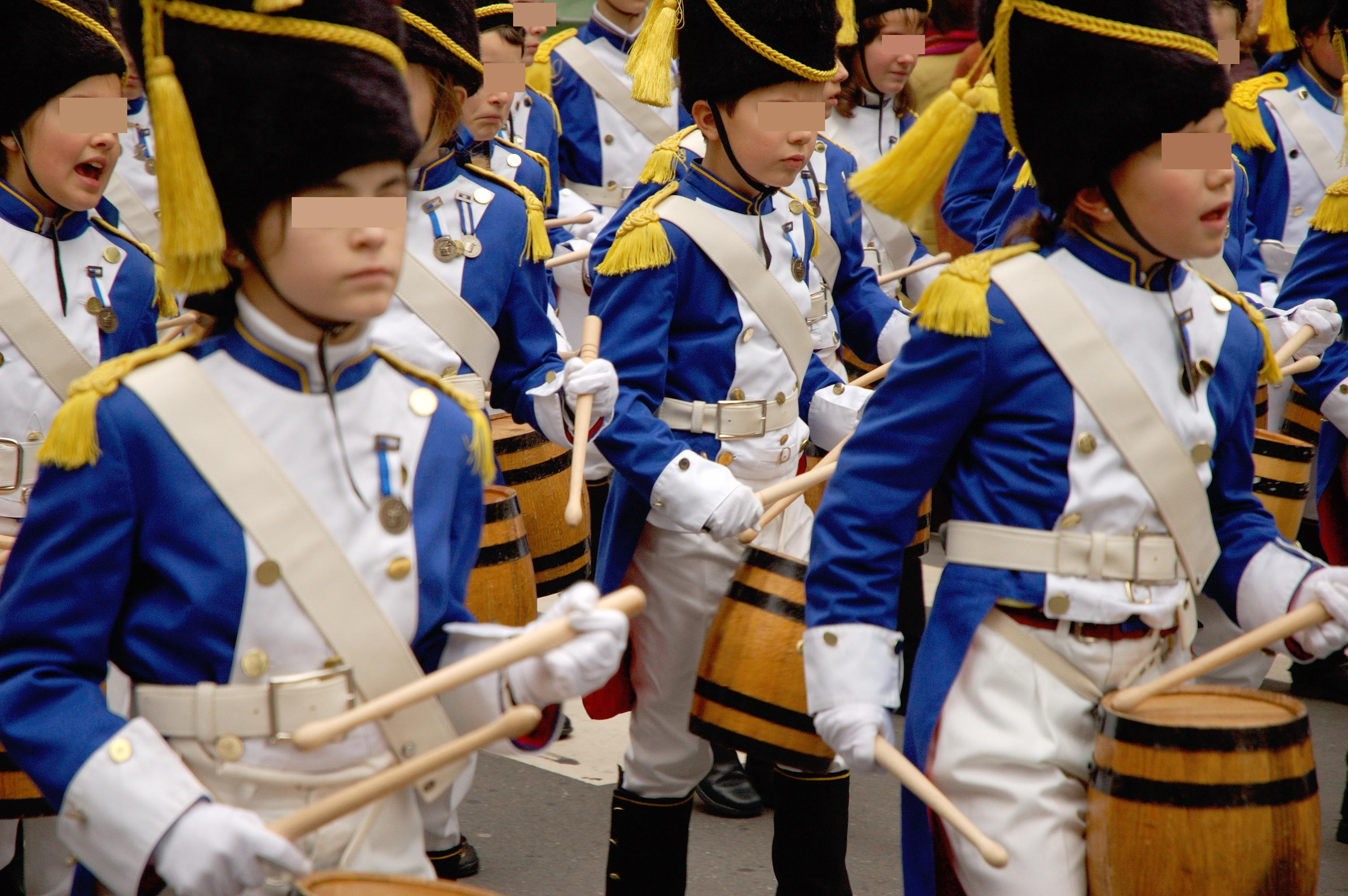 Imagen de una compañía de la Tamborrada infantil de San Sebastián (Guipúzcoa, España)